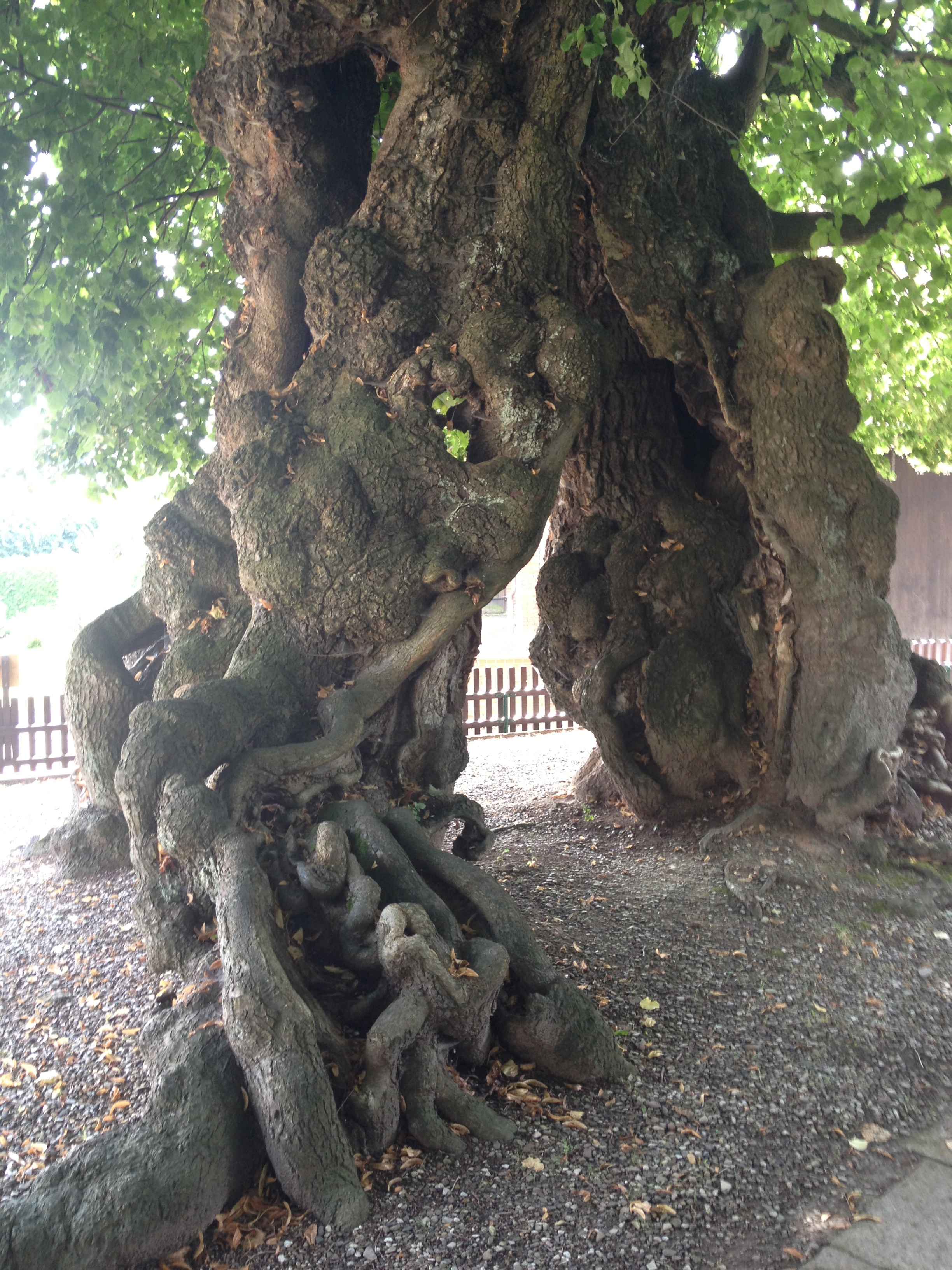 1000-jährige Dicke Linde in Upstedt